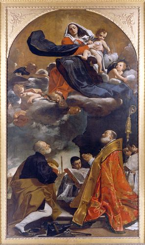 Pala de San Aló